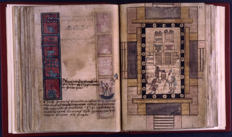 Llegada de los espanoles a tenochtitlan segun codice aubin